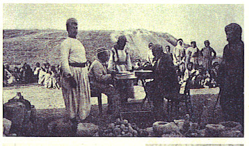 גוטליב שומכר בחפירות אתר תל מגידו